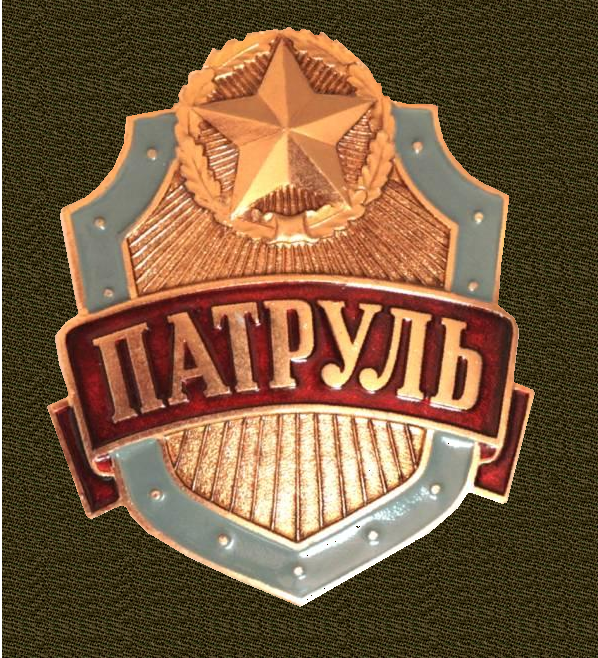 Патруль